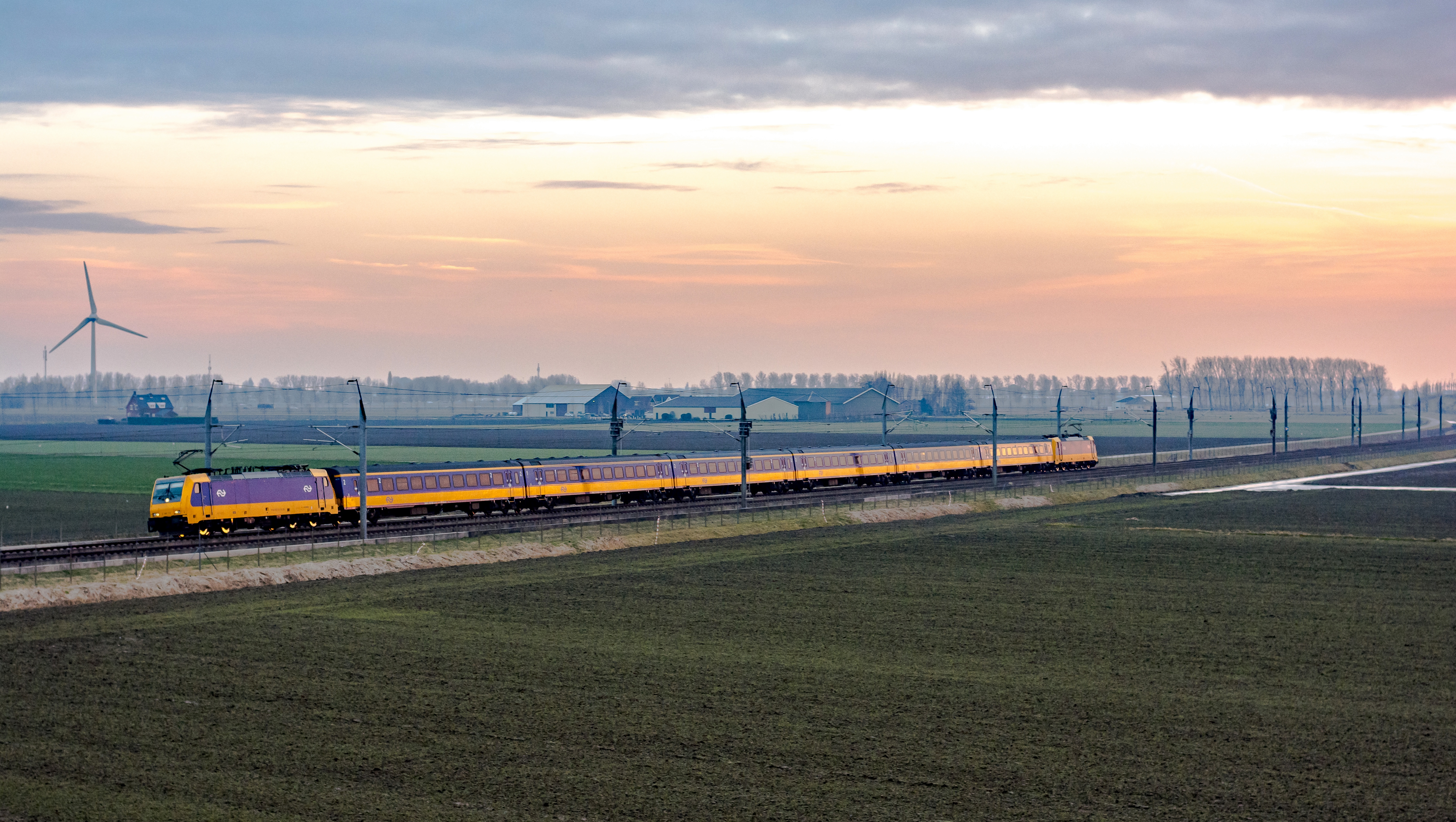 Terwijl de avond valt bij Nieuw-Vennep komt over de HSL; NS 186 112-IC-direct-186 045, als trein 1043 uit Rotterdam Centraal naar Amsterdam Centraal.